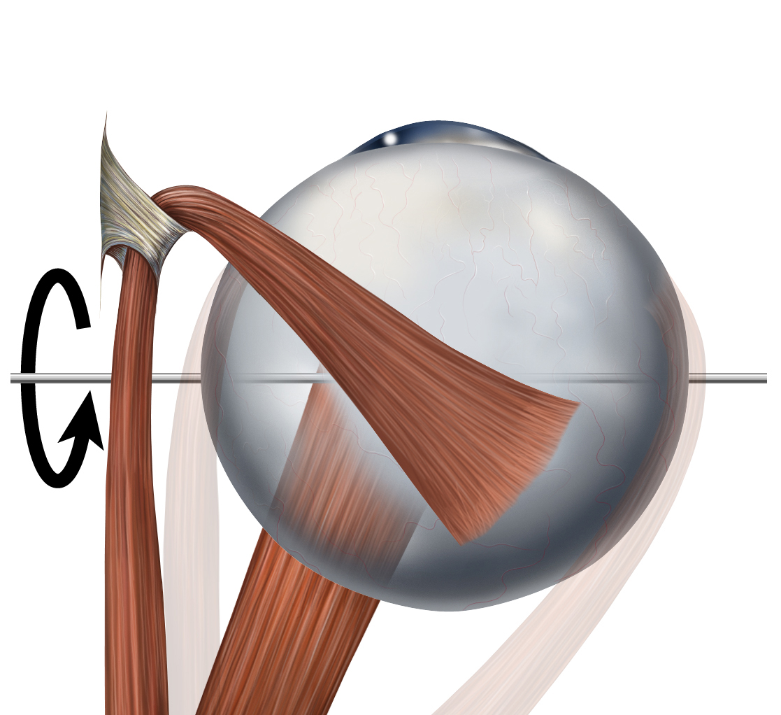 Eye movements depressors